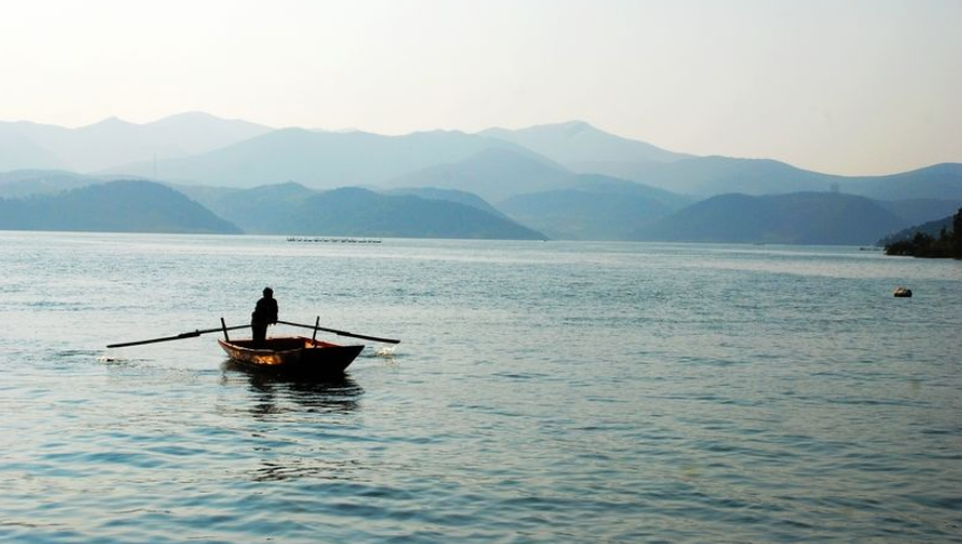 Dan river in China